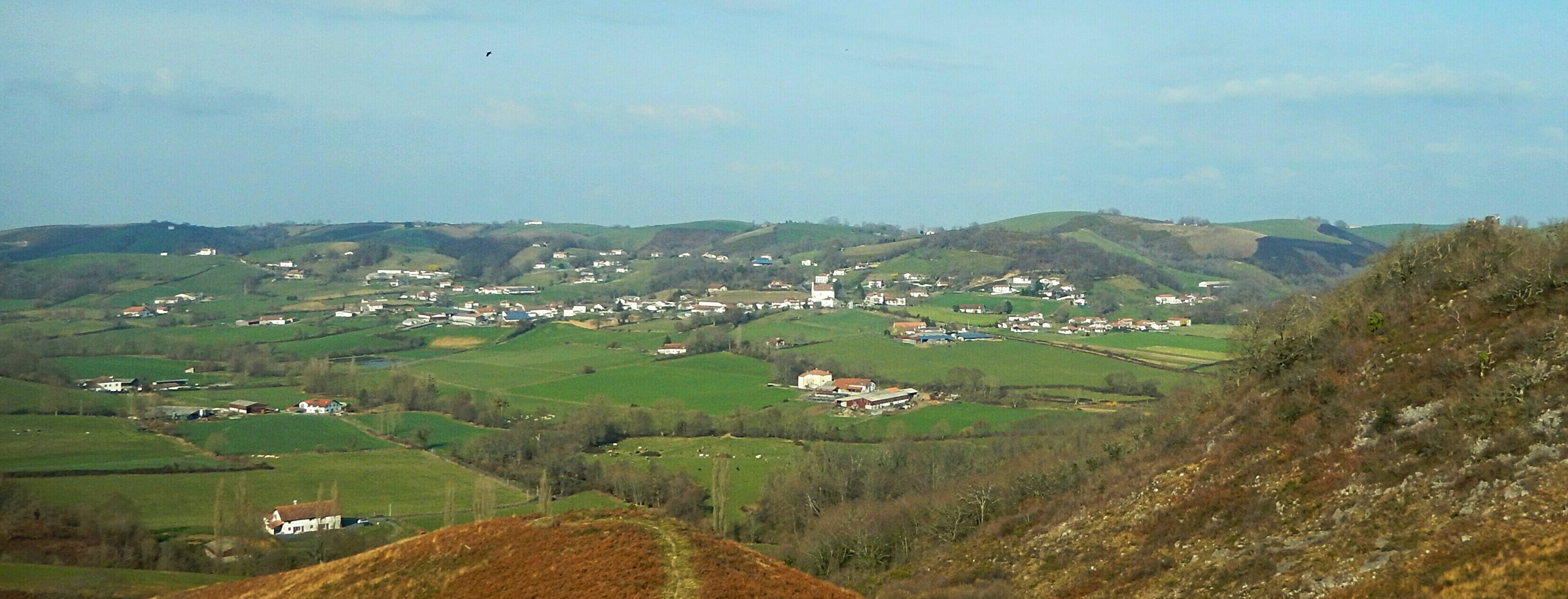 Vue générale du village d'Isturitz et de la vallée de l'Arbéroue, depuis la colline Gaztelu. On aperçoit à droite la tour ruinée du château Rocafort.